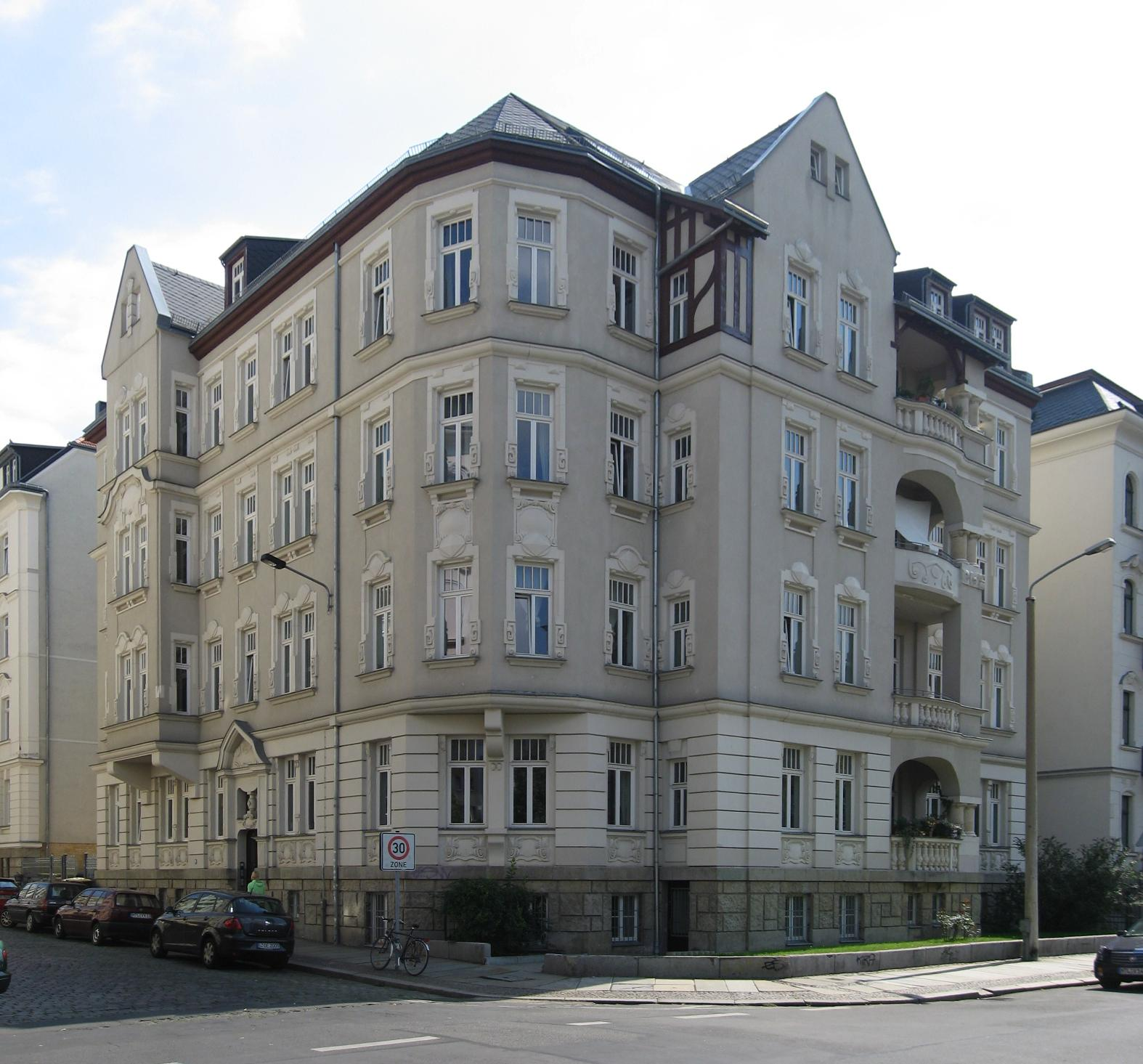 Mehfamilienwohnhaus Hardenbergstraße 18 / August-Bebel-Straße in Leipzig, Südvorstadt; erbaut 1904/1905 von Otto Paul Burghardt